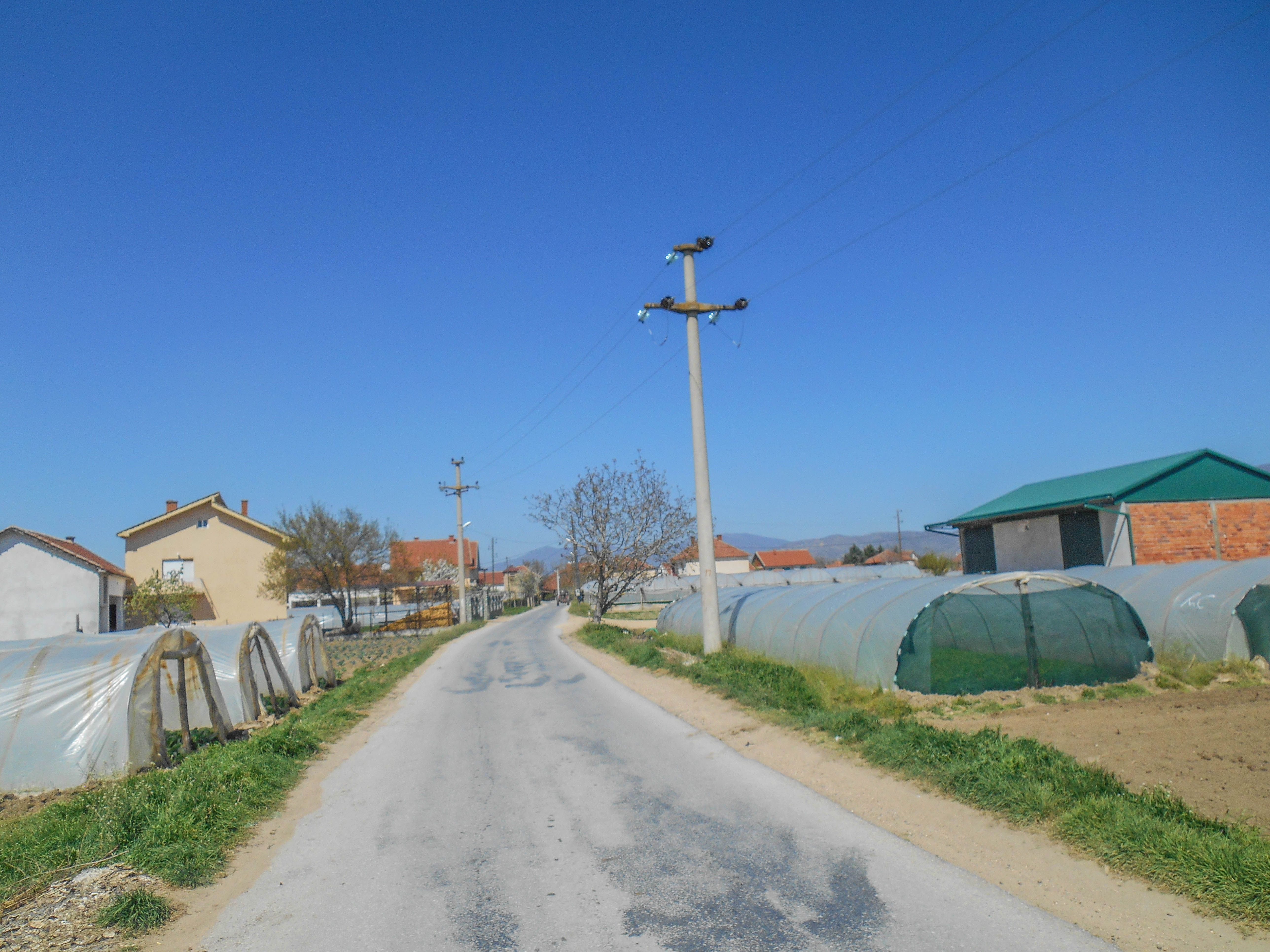 Сарај, Босилово